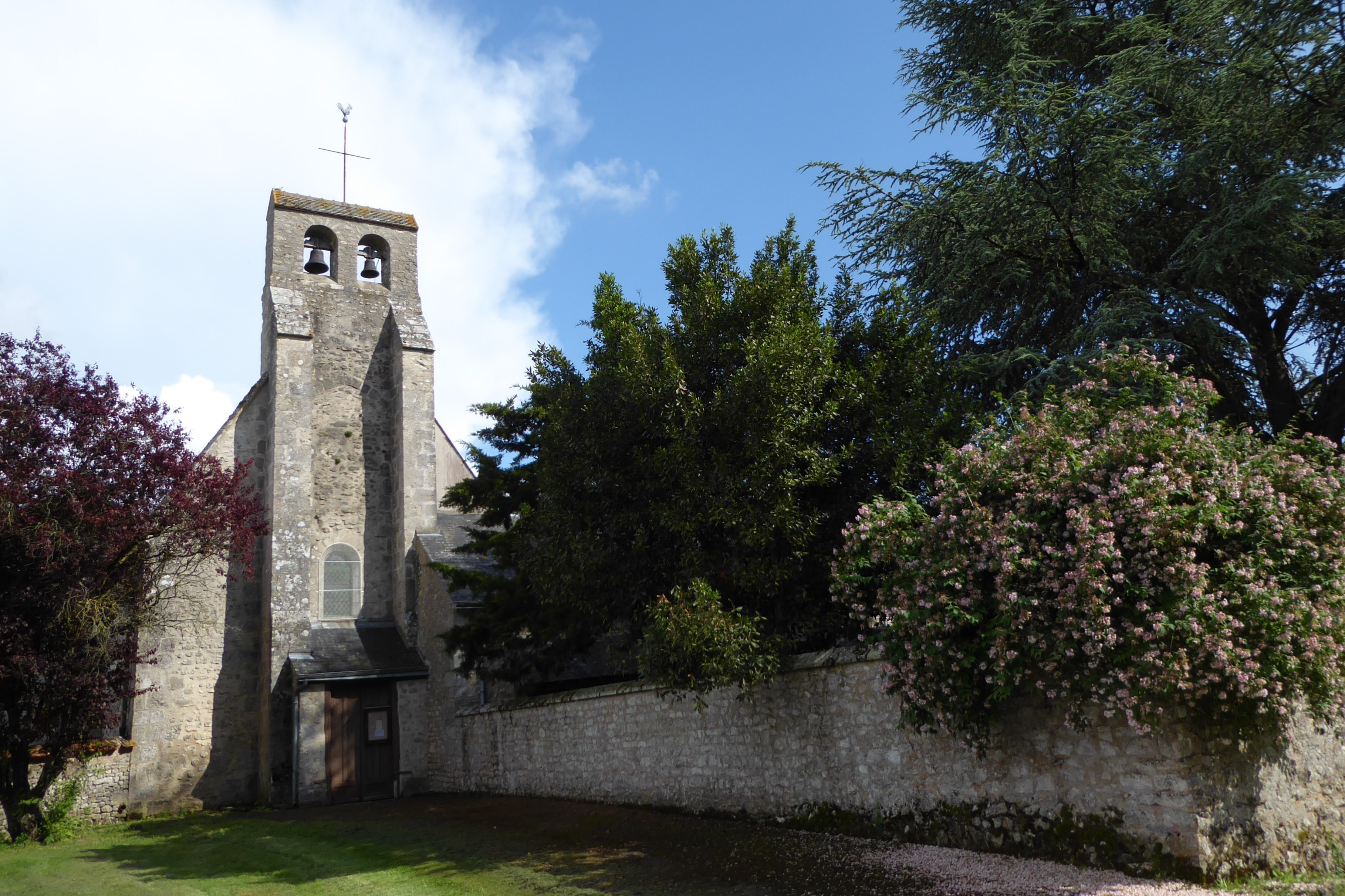 église Saint-Martin du Pré-Saint-Martin, Eure-et-Loir, France.